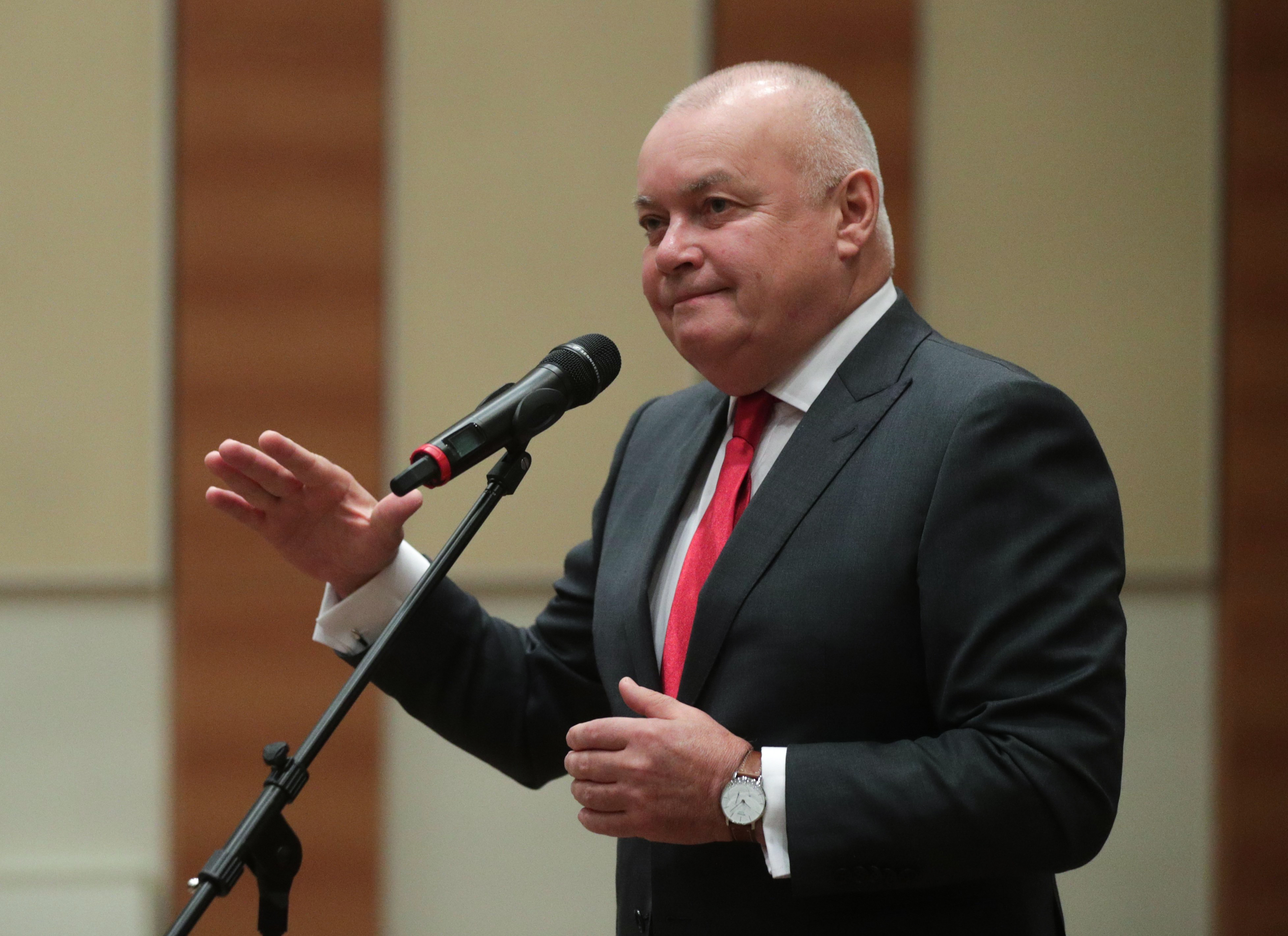 Дмитрий Константинович Киселёв (род.1954) — российский тележурналист